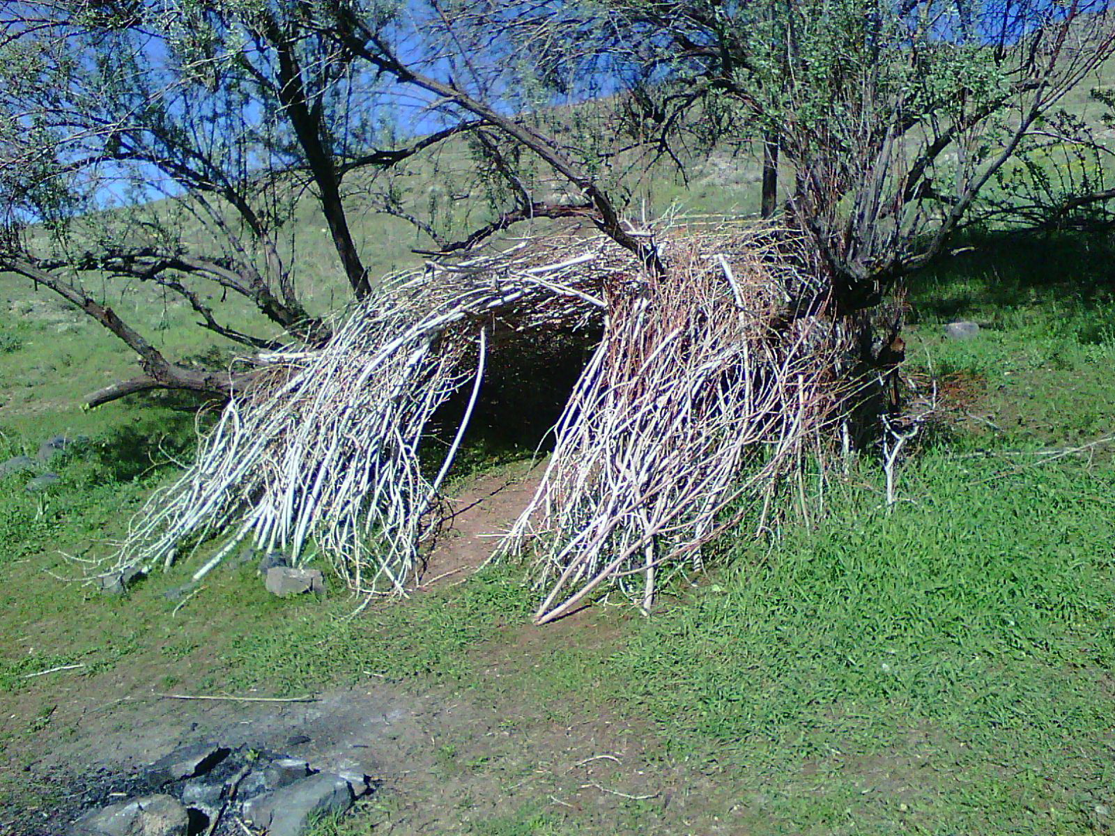 کپر چوپانی به شیوه انسان‌های اولیه